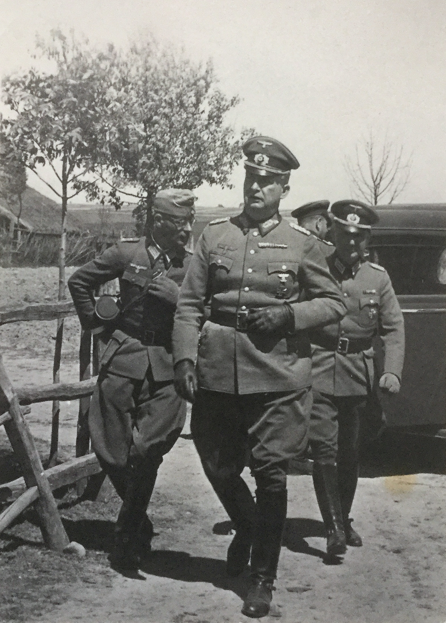 Generalleutnant Konrad von Cochenhausen, Kommandeur der 134 I.D. von Okt.1941 bis Dez.1941. Abfotografiert vom Original-Papierabzug, keine Retusche (außer minimalen Gradationskorrekturen). Lediglich der damals beliebte "Büttenrand" des Fotos wurde entfernt.